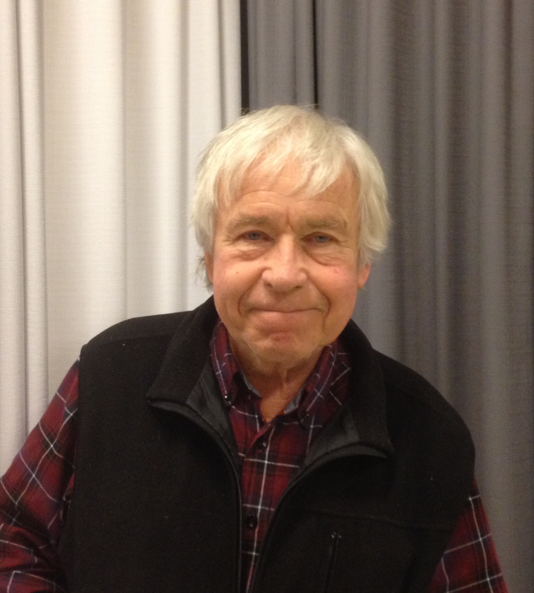 Johan Lönnroth, 2017.